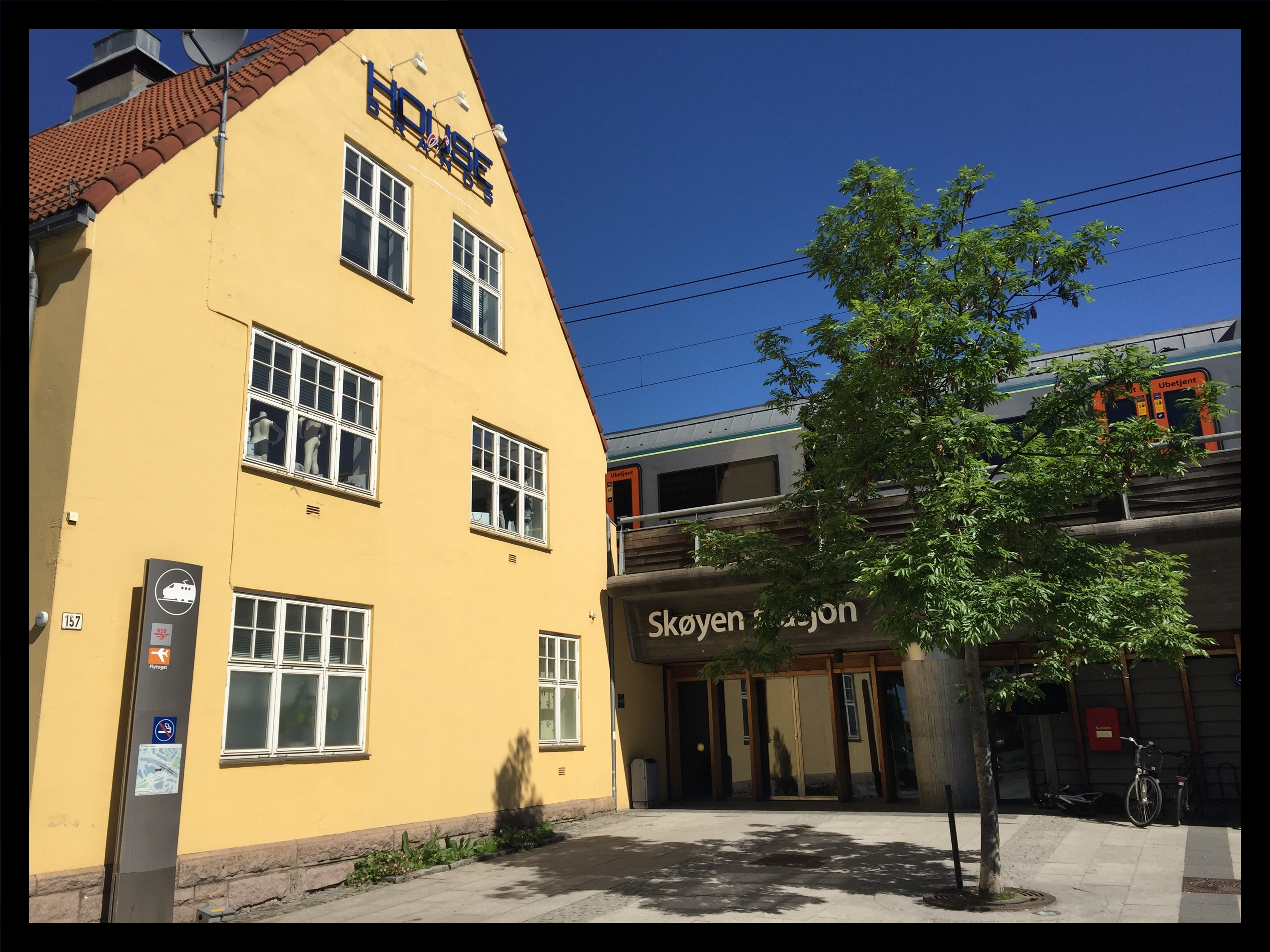 Hovedinngang og torvet